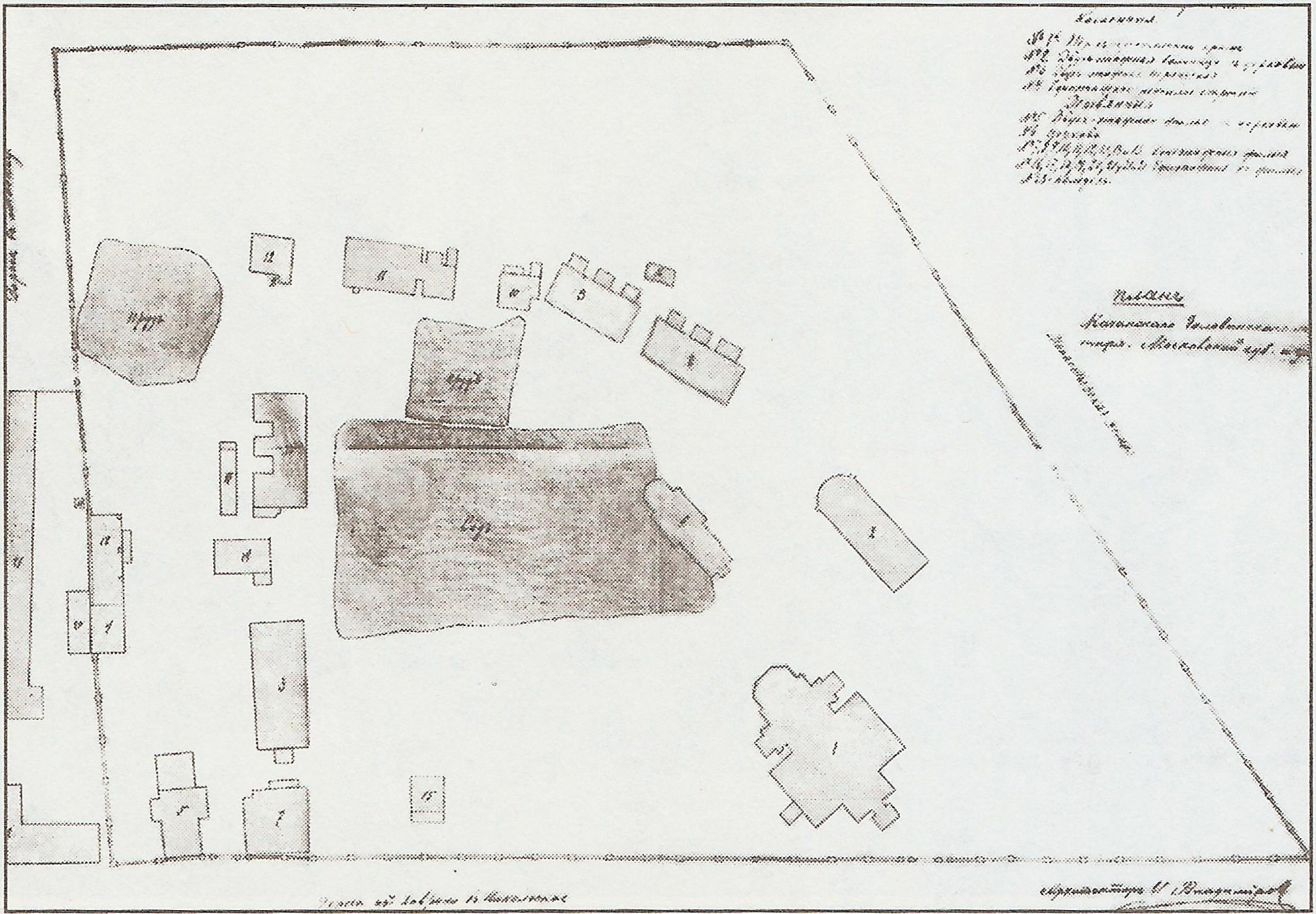 План Казанского Головинского монастыря